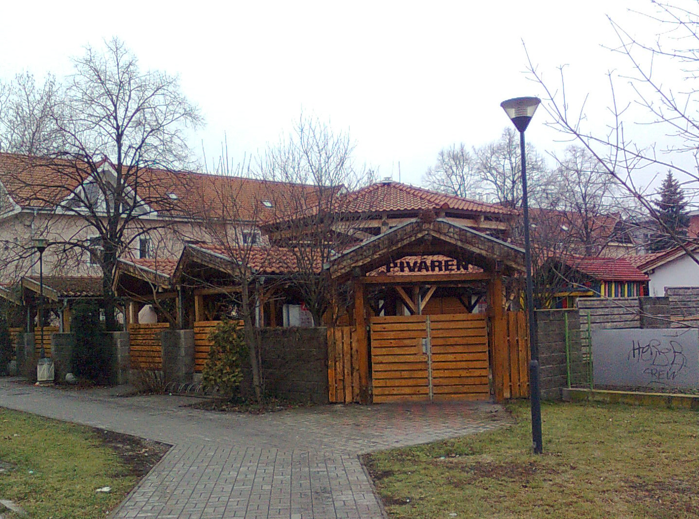 Šaľa - piváreň